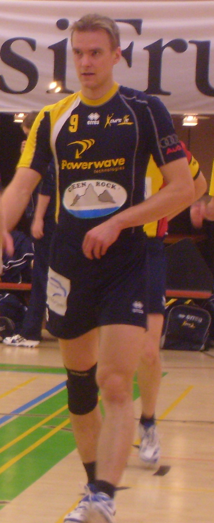 Antti Malinen SM-liigaottelussa 26.1.2008